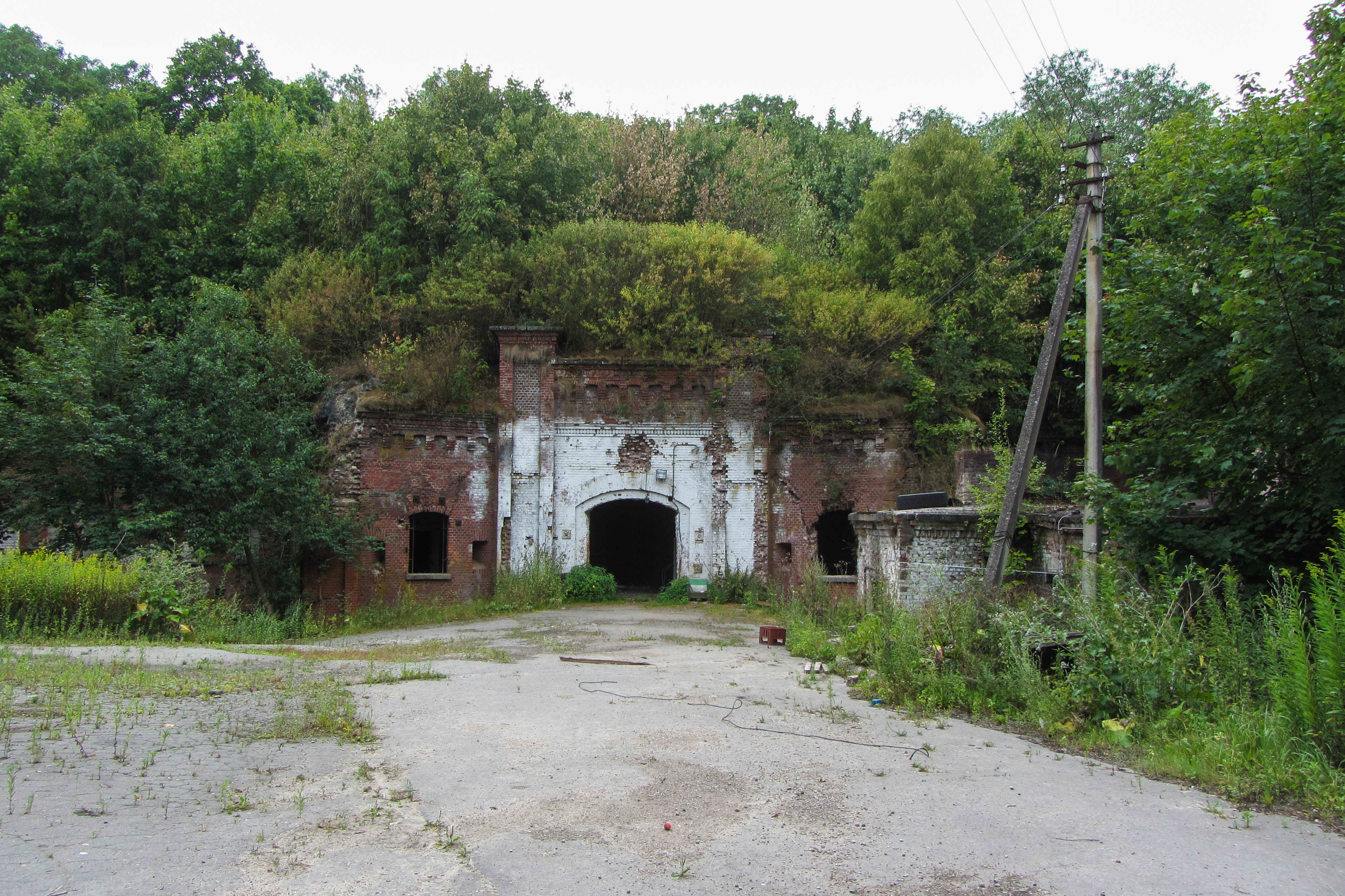 8 форт в Калининграде. Тыльная сторона